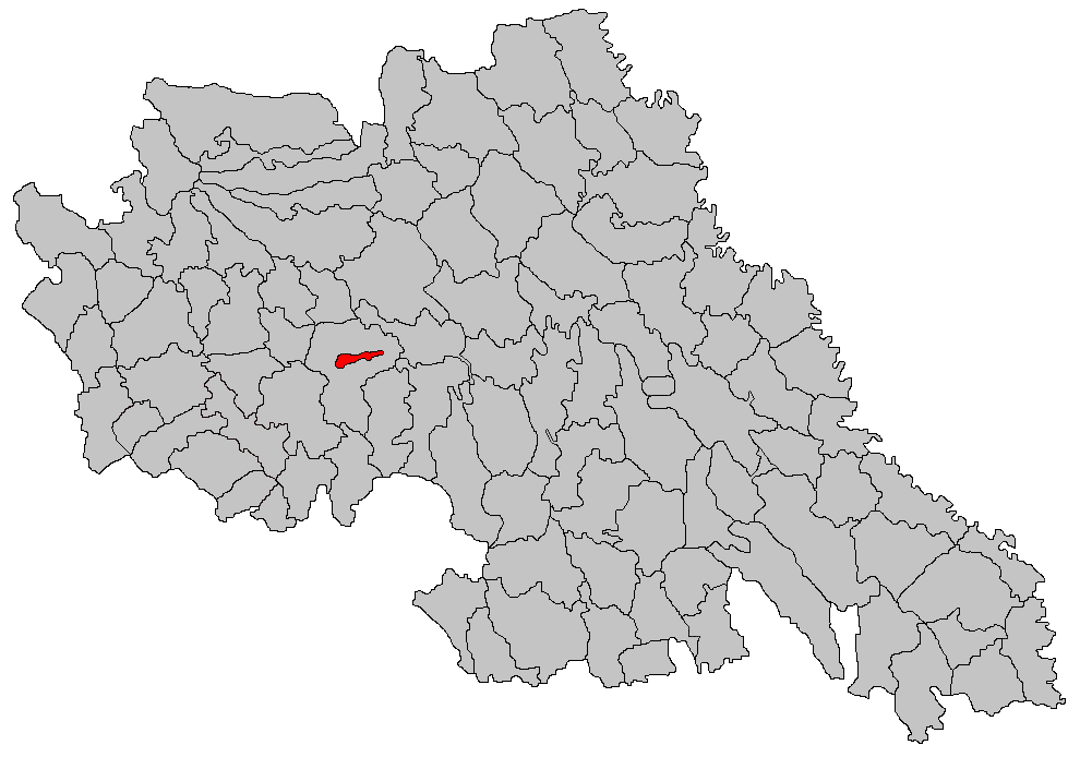 Categorie:Hărţi ale judeţului Iaşi